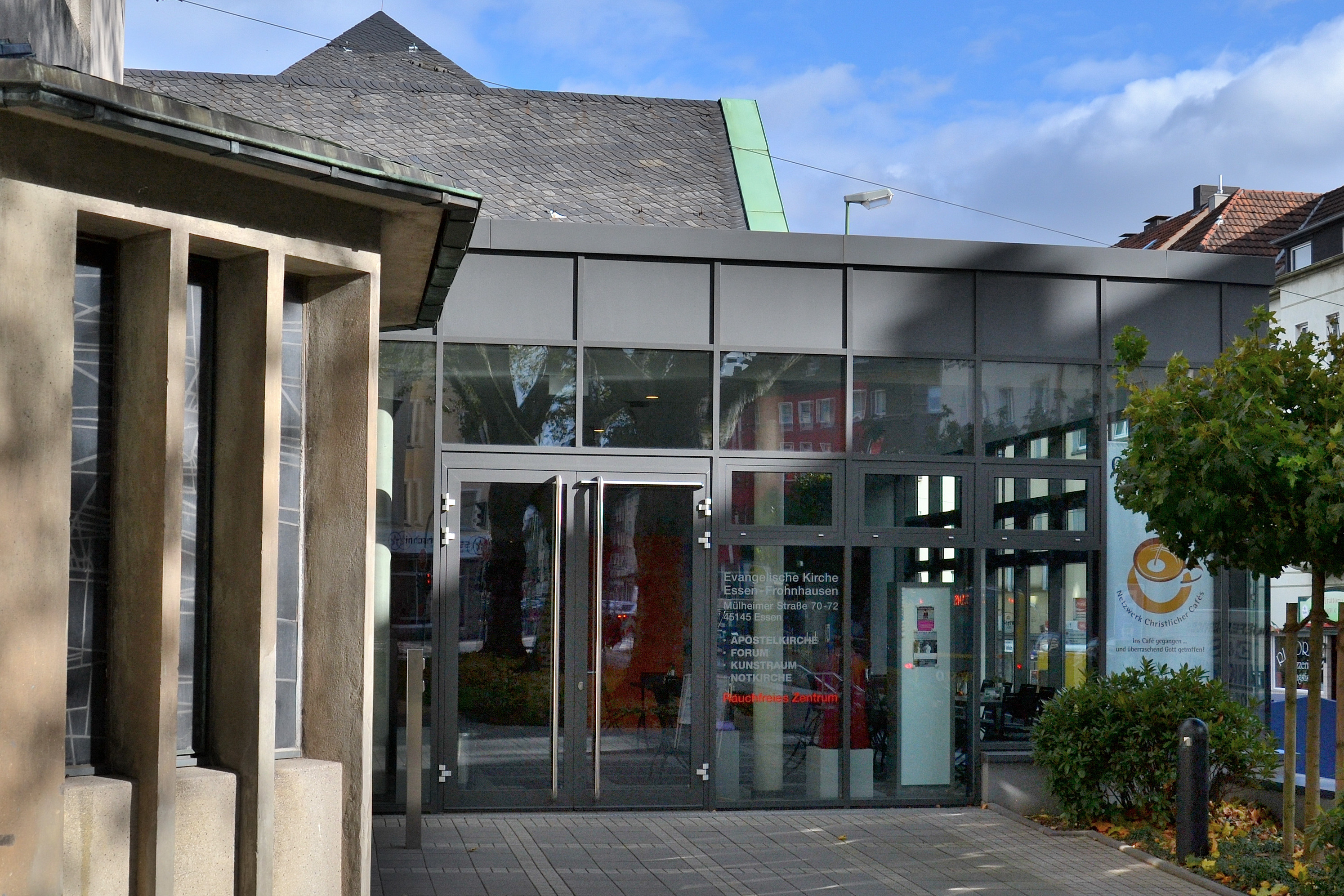 Forum-Apostelzentrum an der Apostelkirche in Essen-Frohnhausen